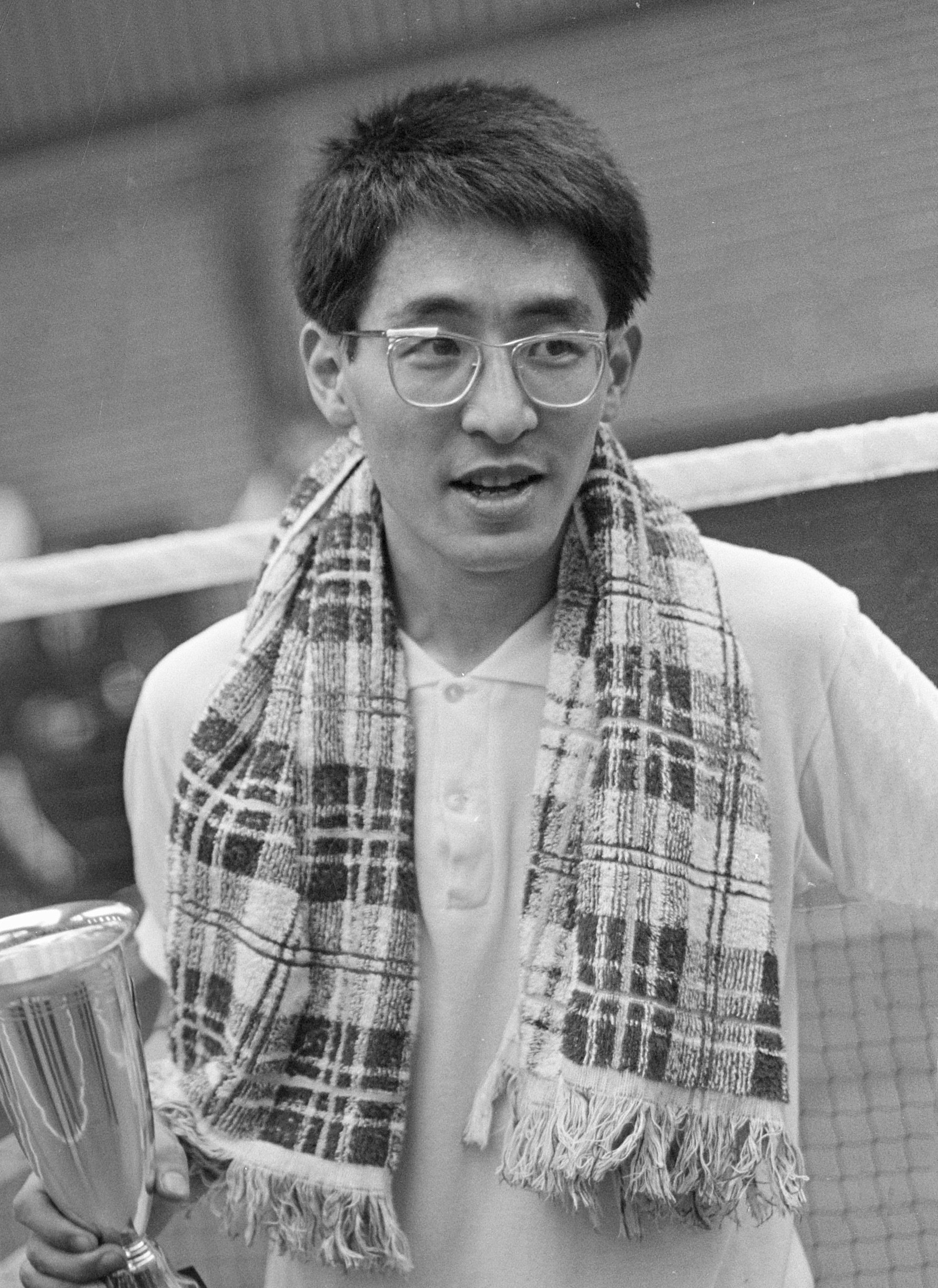 Oon Chong Hau